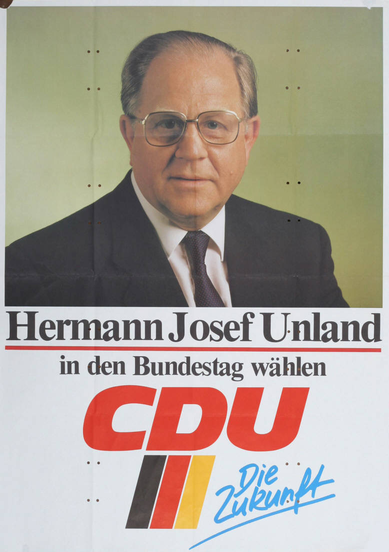 Hermann Josef Unland in den Bundestag wählen CDU Die Zukunft Abbildung: Porträtfoto Plakatart: Kandidaten/Personenplakat mit Objekt-Signatur: 10-001: 2992 Bestand: Plakate zu Bundestagswahlen (10-001) GliederungBestand10-18: Plakate zu Bundestagswahlen (10-001) » Die 11. Bundestagswahl am 25. Januar 1987 » CDU » Mit Porträtfoto Lizenz: KAS/ACDP 10-001: 2992 CC-BY-SA 3.0 DE